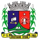 Português do Brasil: brasão oficial do municipio